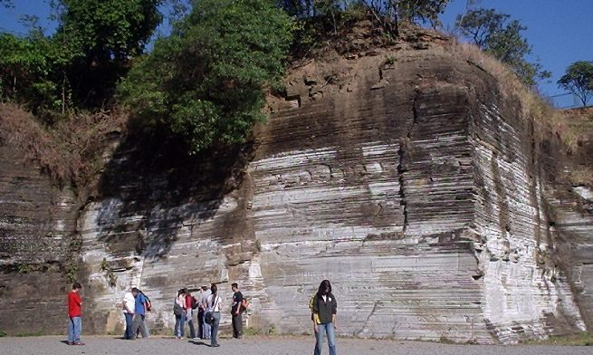 Varvite quarry. Paredão de varvito